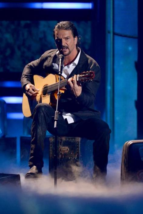 Ricardo Arjona en premios lo nuestro 2015